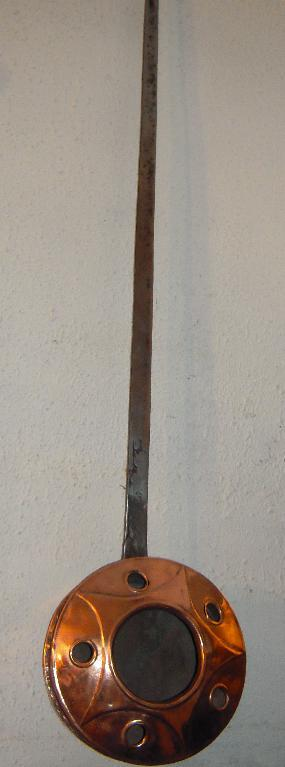 bassinoire en cuivre à manche de fer (outil traditionnel utilisé comme chauffe-lit) Unknown